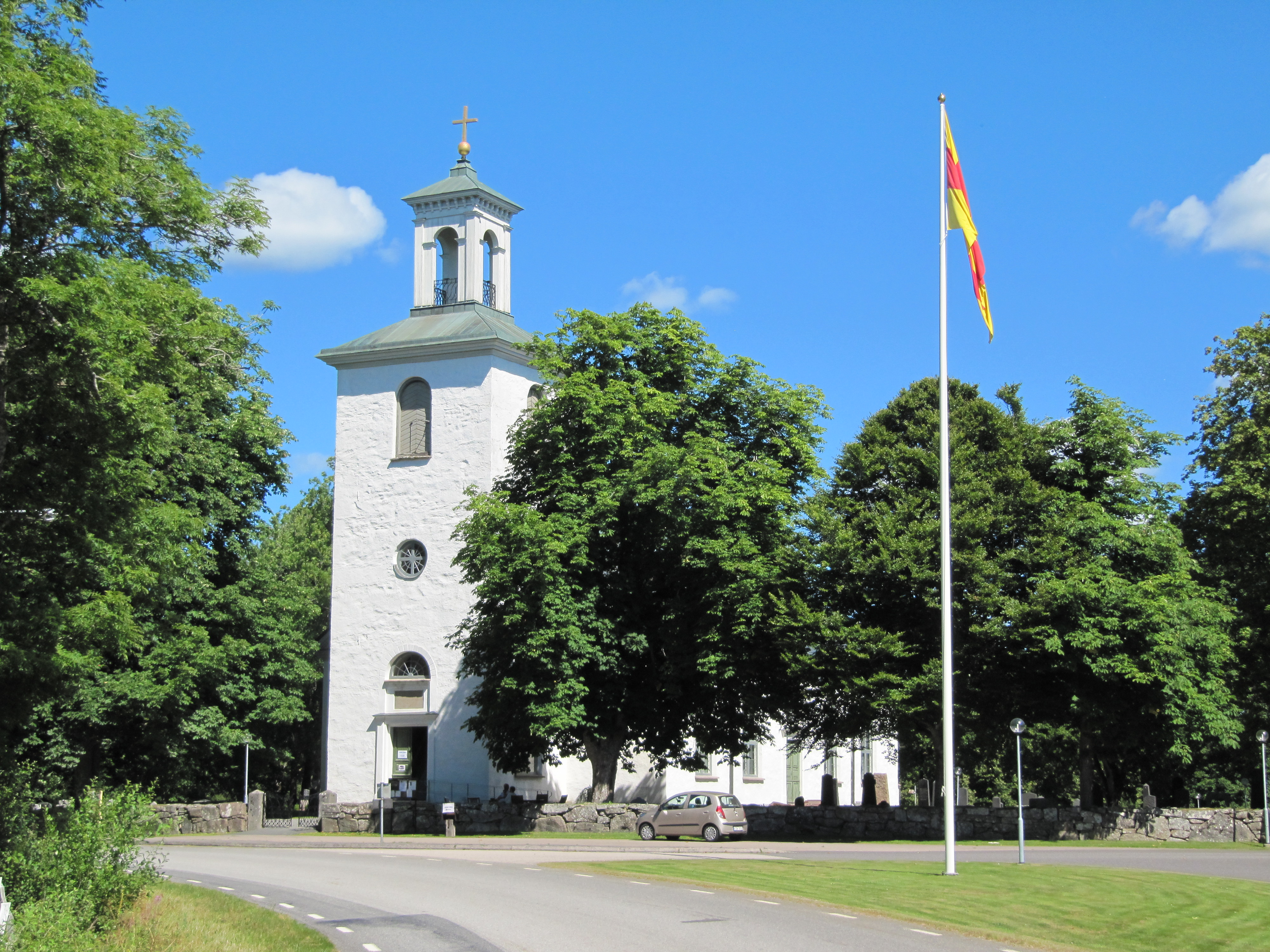 Voxtorps kyrka